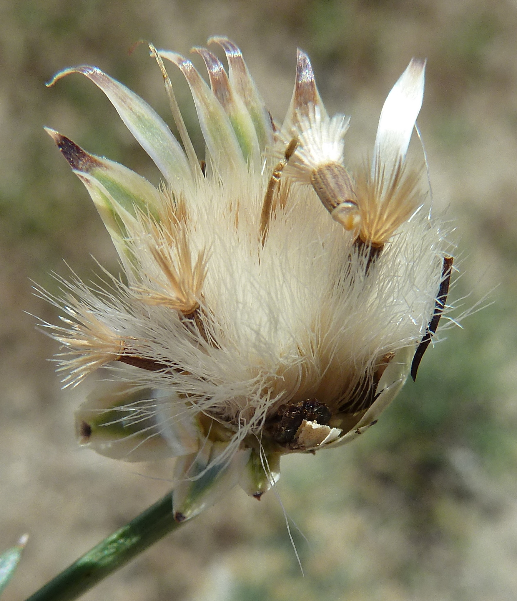 Mantisalca salmantica - Capítulo en fructificación, con cipselas in situ - Circa Estación de Contenedores de RENFE/ADIF de Abroñigal/Embajadores, Madrid (España).